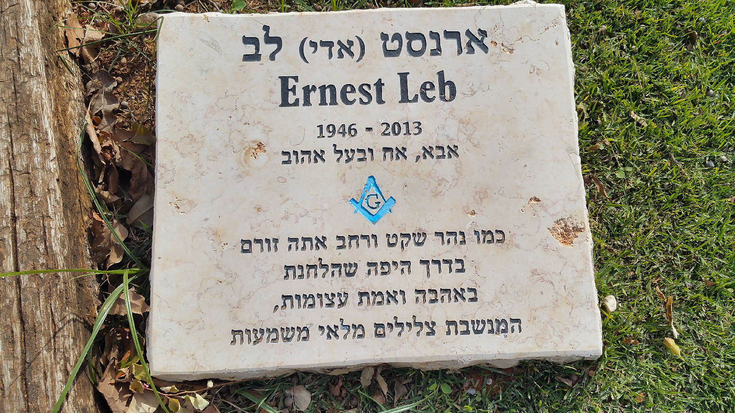 המצבה על קברו של ארנסט לב. כפר סבא